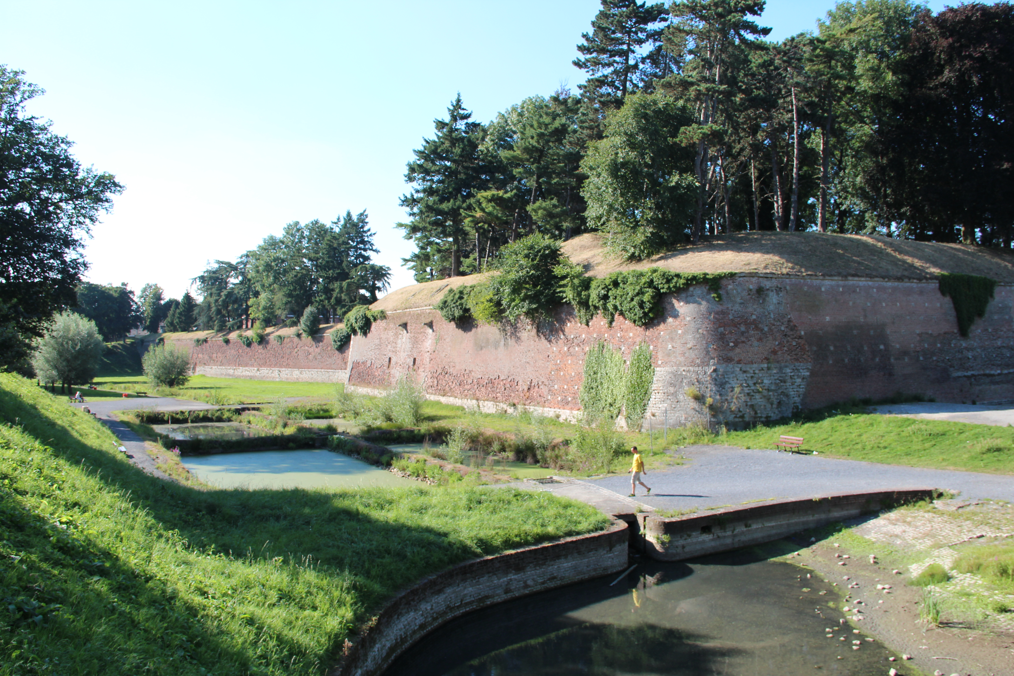 Bastion vert de la citadelle Vauban - Le Quesnoy (Nord, France).